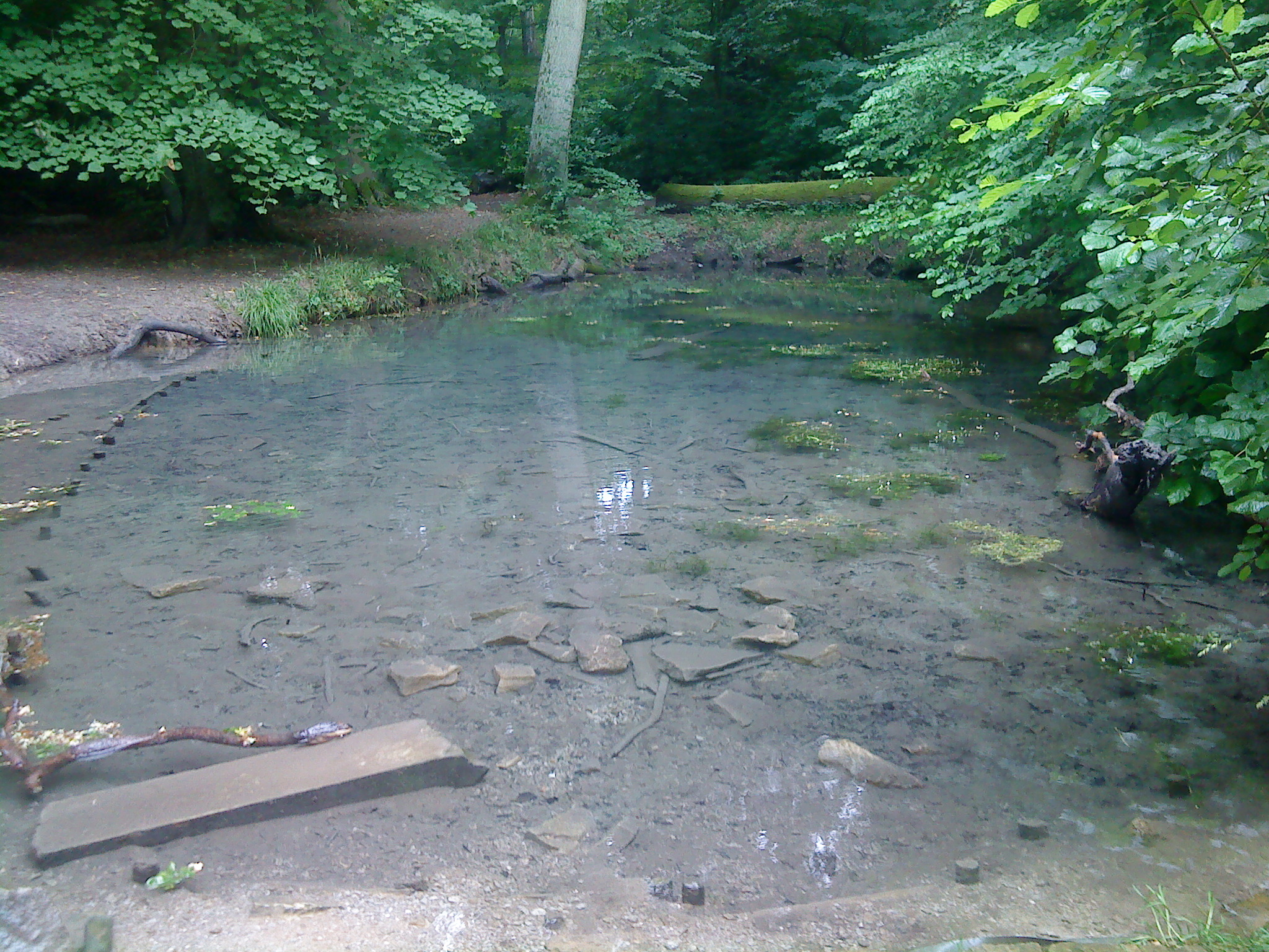 Karstquelle "Kutscherloch" der Lutter. Die Lutter ist ein Bach, der am Rande des Elm (ein Höhenzug beim Ort Königslutter in die Schunter mündet.